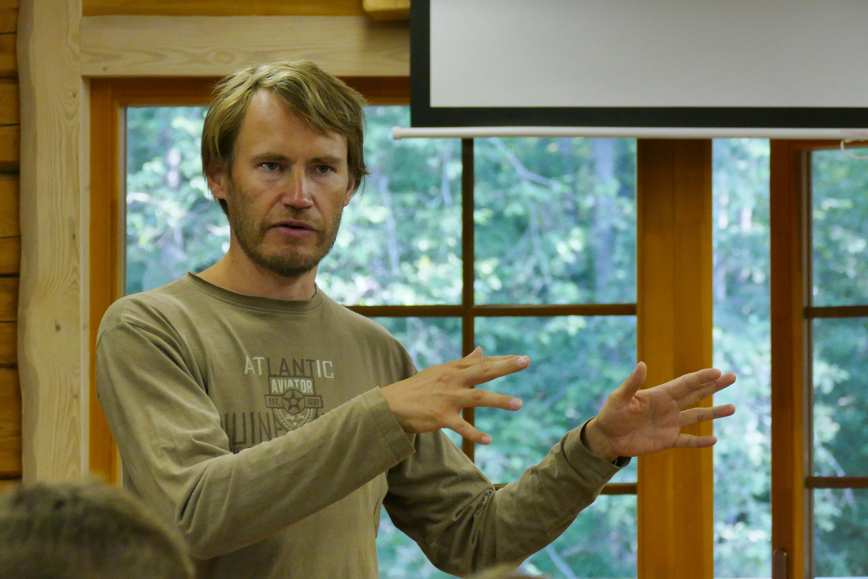 Soome-ugri vikiseminar Piusa ürgoru puhkekeskuses, 2. päev. Sven-Erik Soosaar.